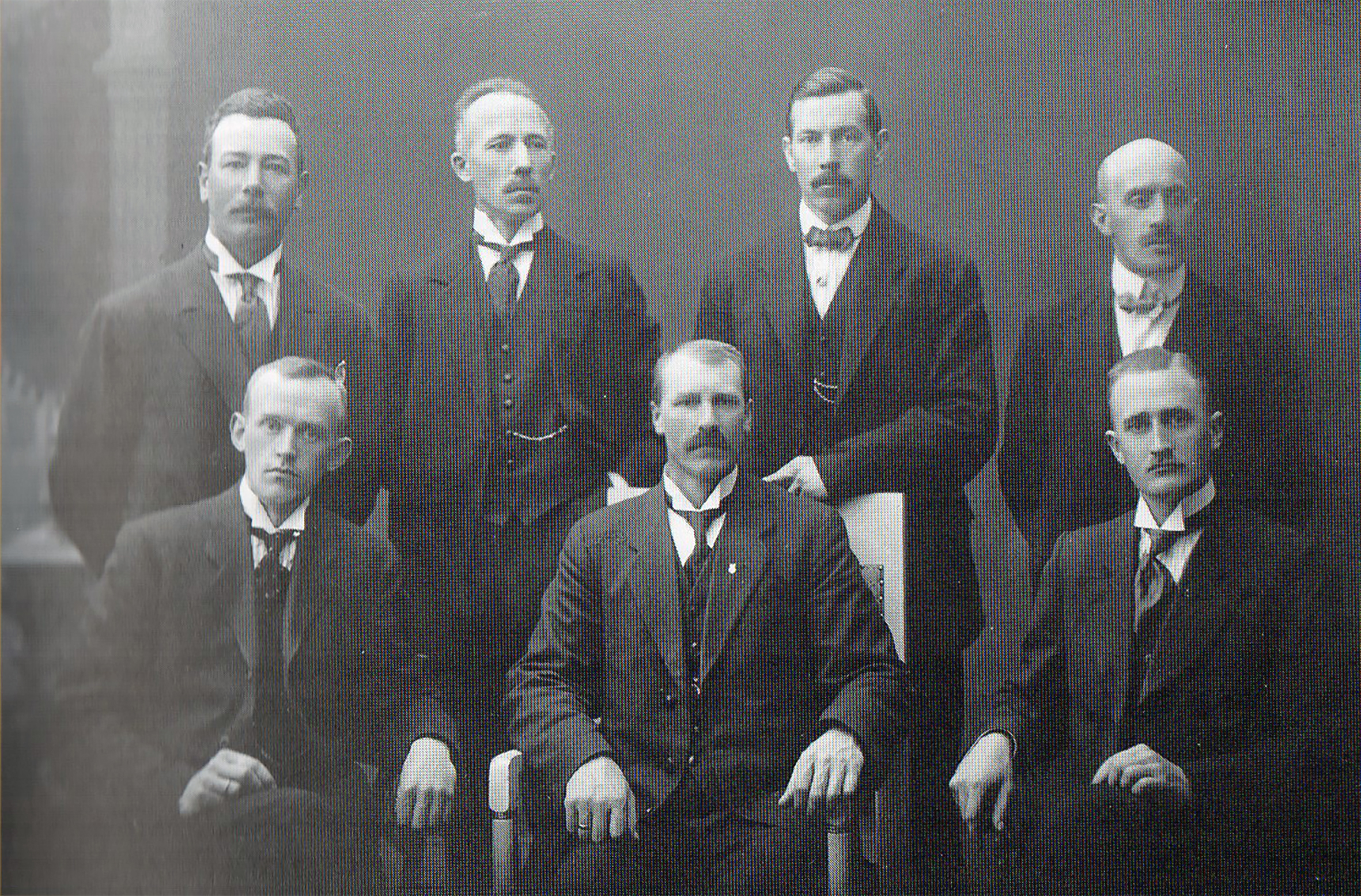 Norsk fengsels- og friomsorgsforbunds grunnleggere. Bildet er tatt på stiftelsesdagen 18.juni 1918